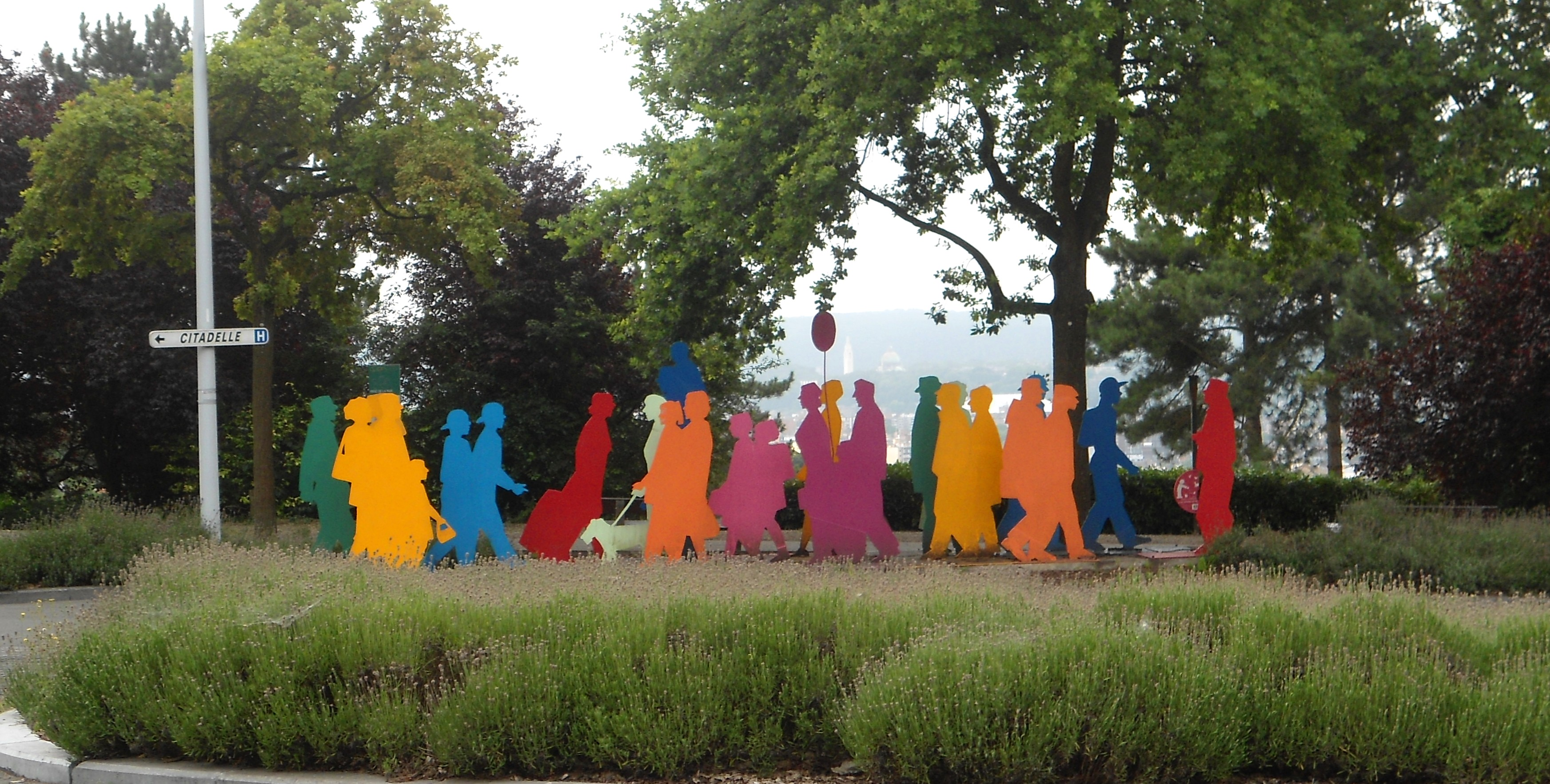 Sculpture de Mady Andrien Les Passants rue de Campine à Liège